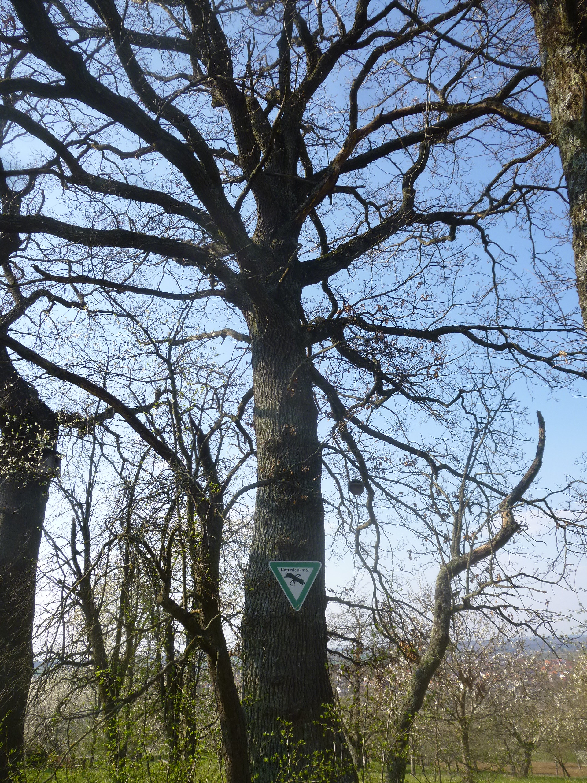 Naturdenkmal "4 Eichen" (Schutzgebiets-Nr. 84160260214) in Nehren .